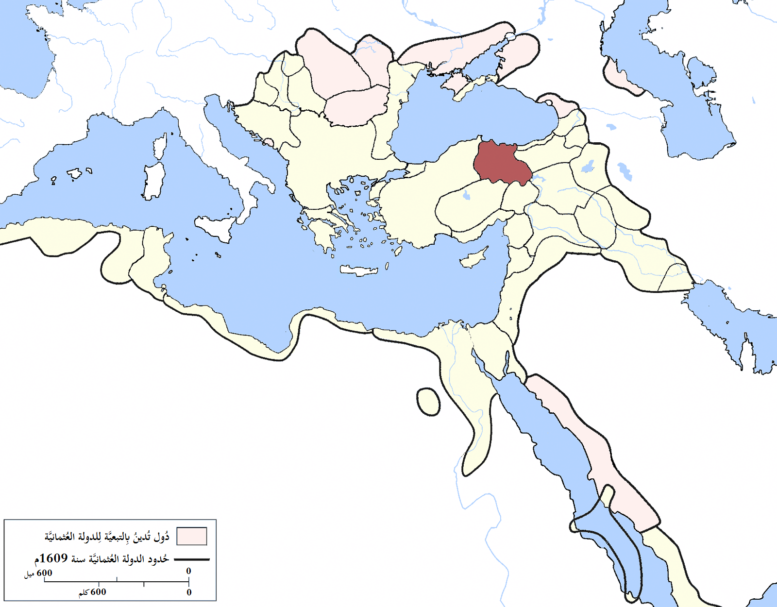 إيالة سيواس بِالدولة العُثمانيَّة سنة 1609م.